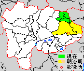 山梨県北都留郡の位置。